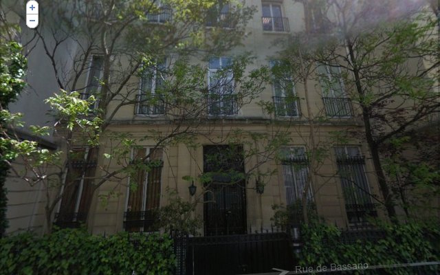 Mansão de Eufrásia Teixeira Leite (40, Rue de Bassano, Paris 75008, próxima à Avenue des Champs-Élysées).